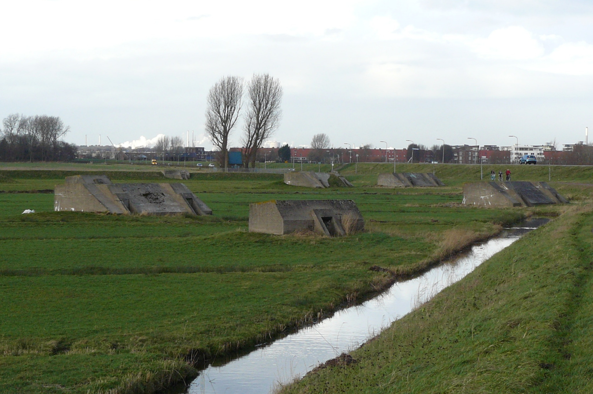 Ten westen van het Fort bezuiden Spaarndam is rond het begin van de Eerste Wereldoorlog een extra verdedigingslinie opgeworpen. Vanwege de hoge duingronden in de nabijheid was het geinundeerde gebied smal. In het terrein voor het fort tussen de Slaperdijkweg en de Spaarndamseweg liggen veel groepsschuilplaatsen Type 1918. Dit cluster ligt tegen de Slaperdijkweg aan.